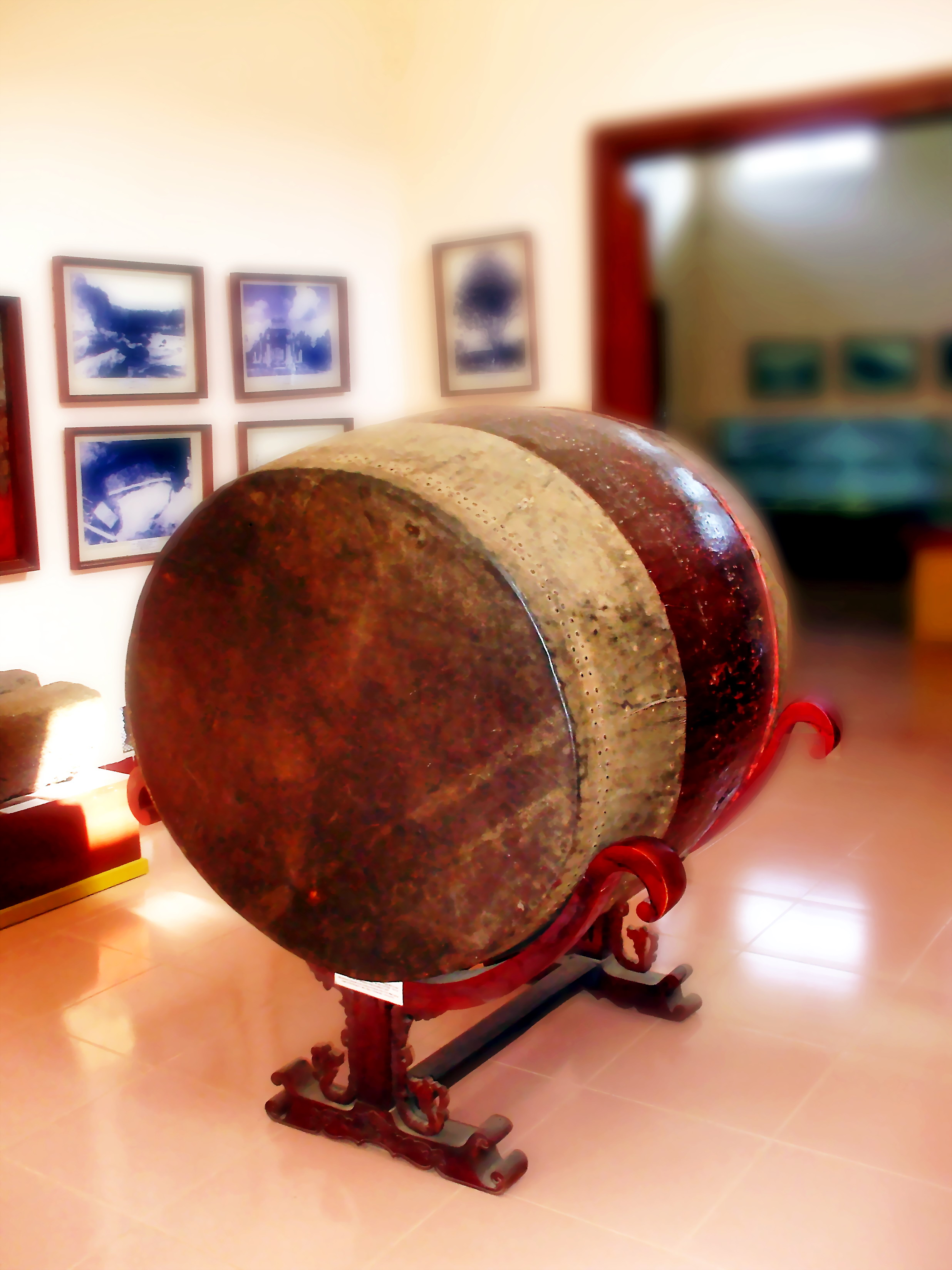 Trống trận thời Tây Sơn hiện đang trưng bày trong Bảo tàng Quang Trung (Bình Định, Việt Nam)